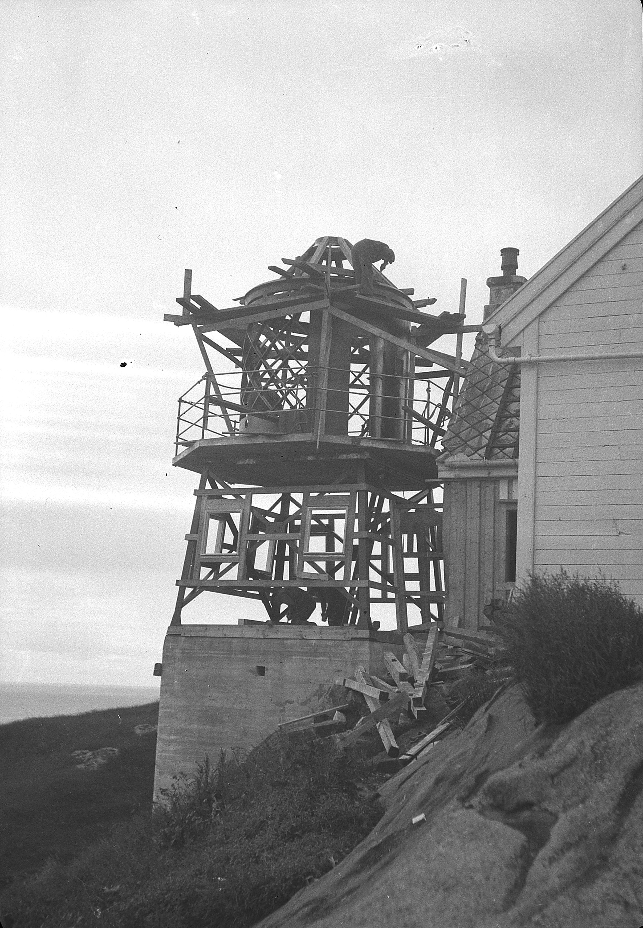 Bildet er hentet fra Arkivverket. Glåpen, Moskenes Arkivinstitusjon : Riksarkivet Arkivnavn : Fyrdirektoratet Sted : Norge, Nordland, Moskenes, Glåpen Emneord: Fyr, Kyst Avbildet